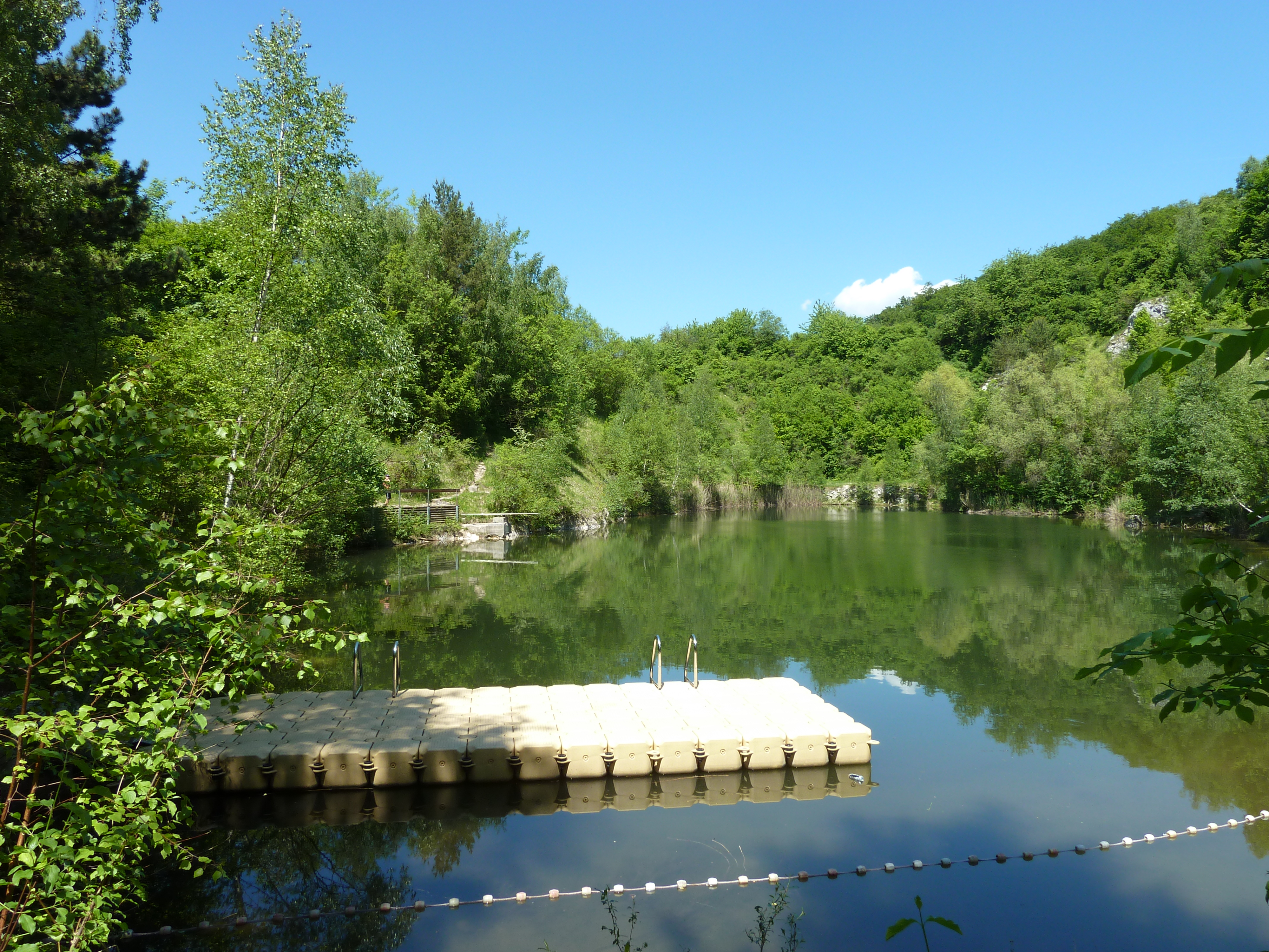 Grüner See bei Witzenhausen-Hundelshausen, Nordhessen. Ehemaliger Gipsbruch, heute Badesee